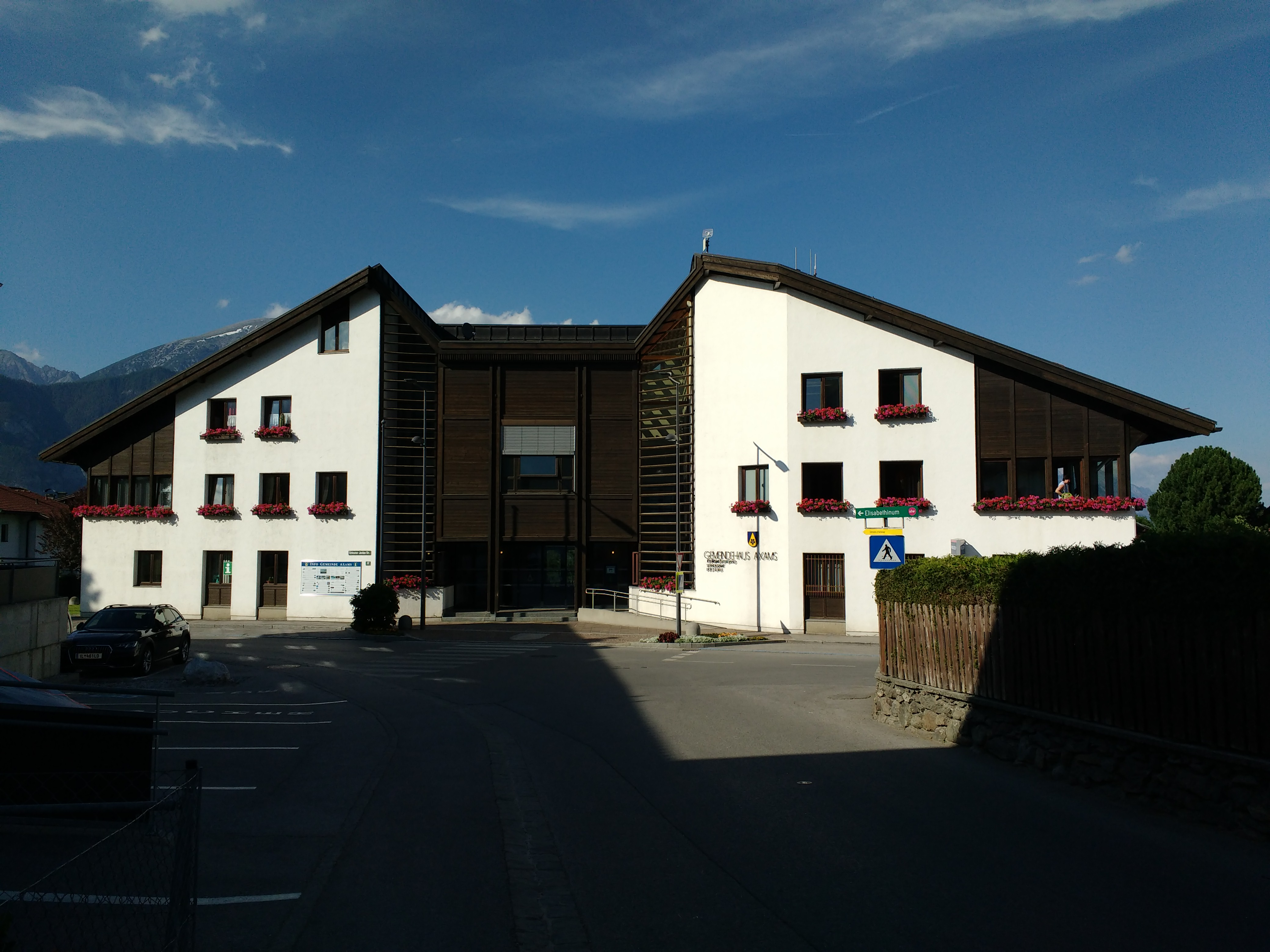 Gemeindeamt Axams This media shows the remarkable cultural object in the Austrian state of Tyrol listed by the Tyrolean Art Cadastre with the ID 28824. (on tirisMaps, pdf, more images on Commons, Wikidata)